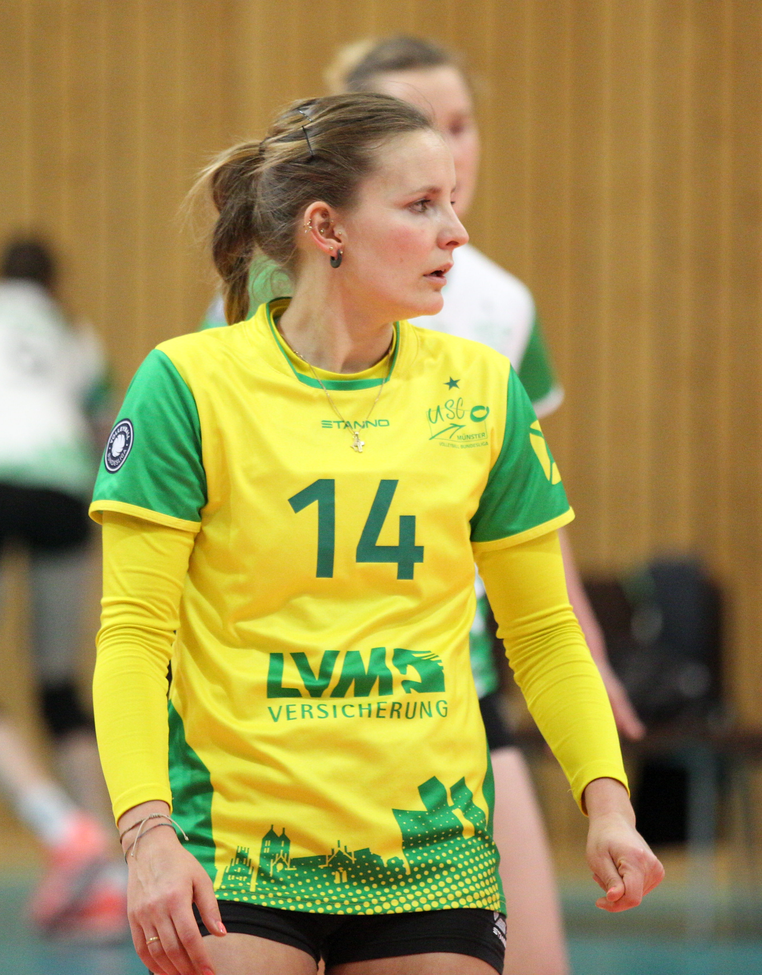 Linda Dörendahl (USC Münster)